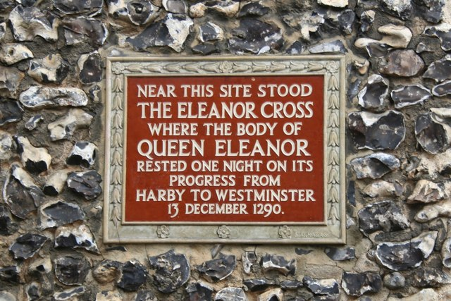 Eleanor Cross Plaque